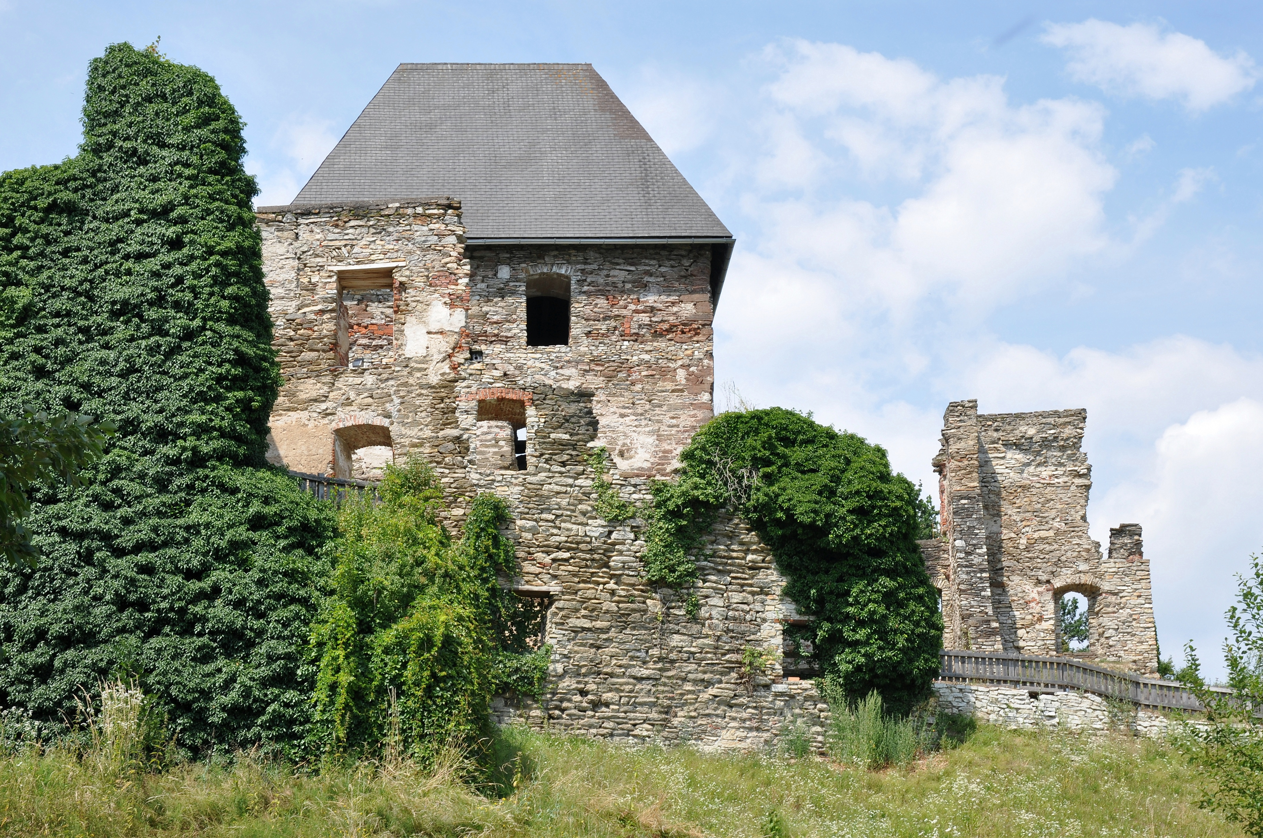 Burgruine Ligist (Altes Schloss, Veste Lubgast)